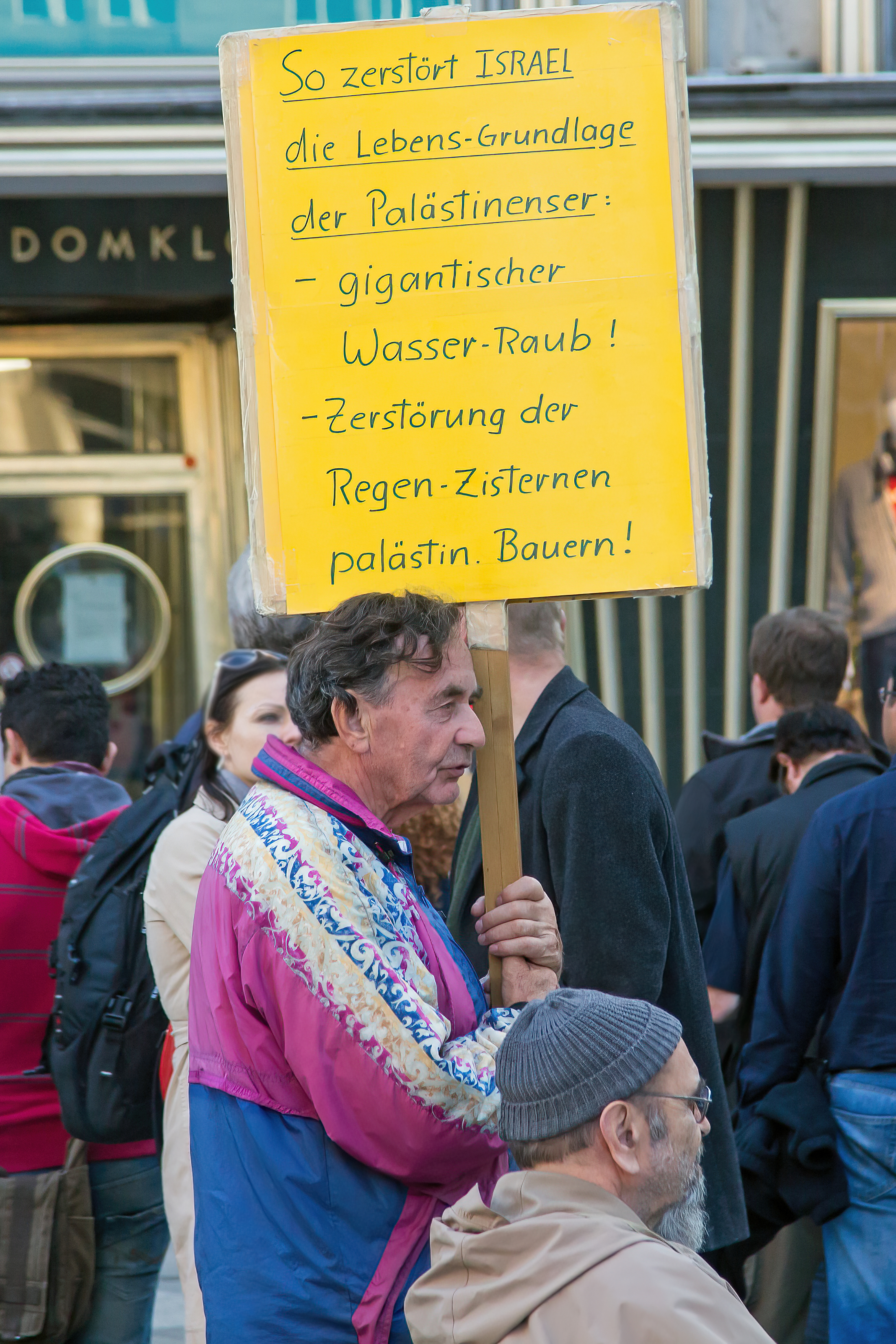 Walter Hermann bei der "Kölner Klagemauer"